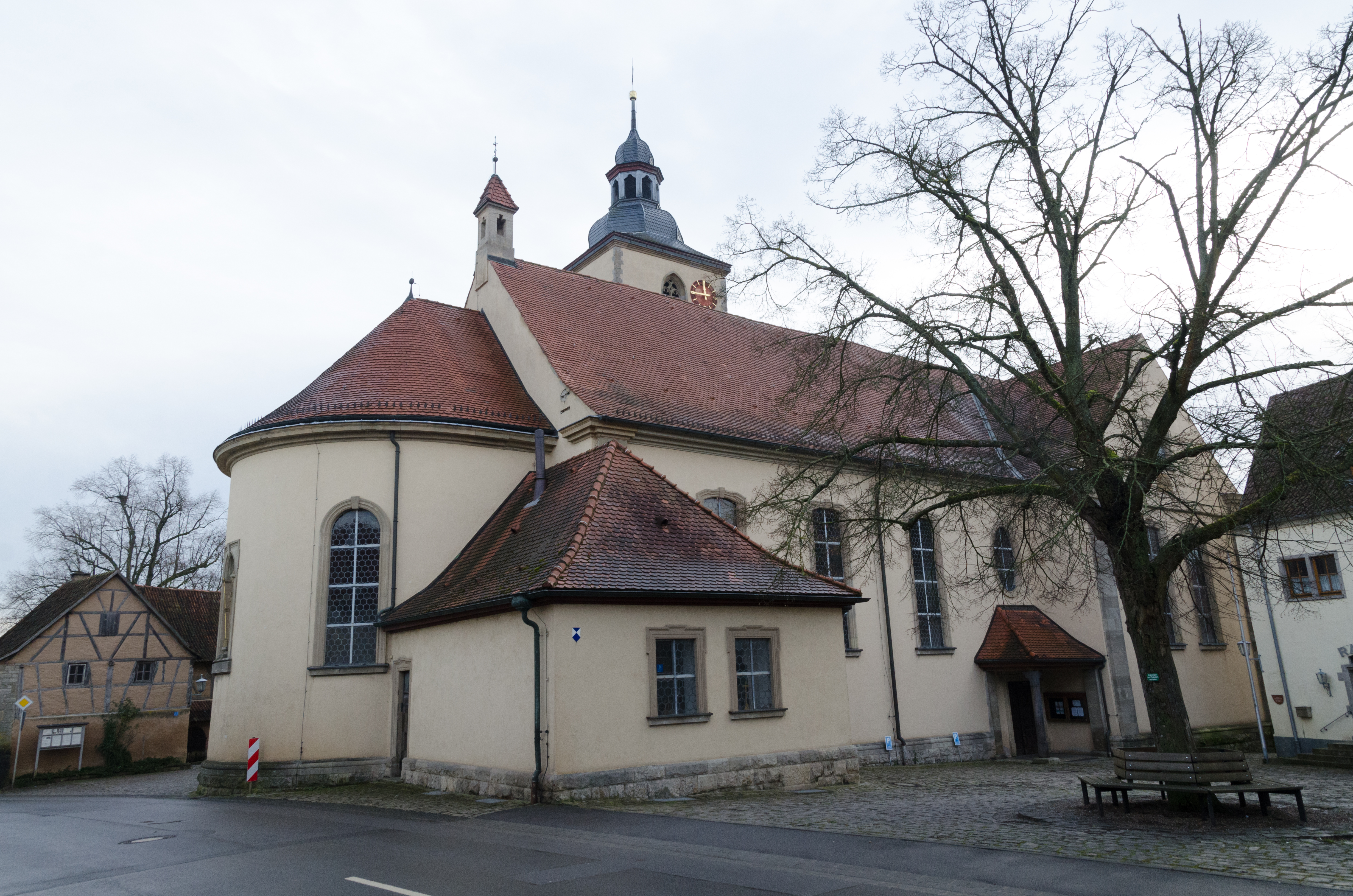 Oberstreu, Katholische Pfarrkirche St. Andreas